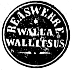 Reastvere vallavalitsuse pitsat. Üleslaadija koopia ja töötlus